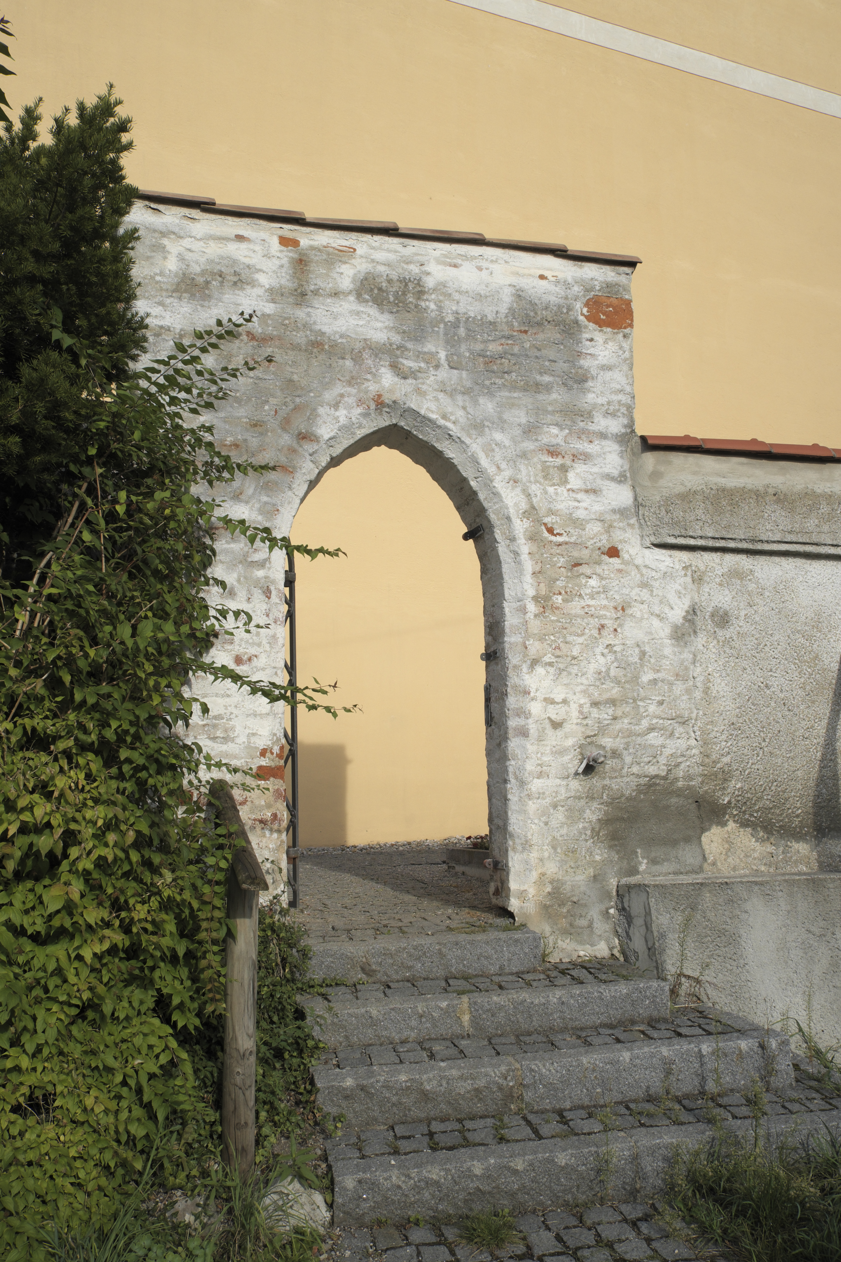 Katholische Pfarrkirche Mariä Himmelfahrt in Walleshausen, einem Ortsteil von Geltendorf im Landkreis Landsberg am Lech (Oberbayern/Bayern), Spitzbogentor der Friedhofsmauer